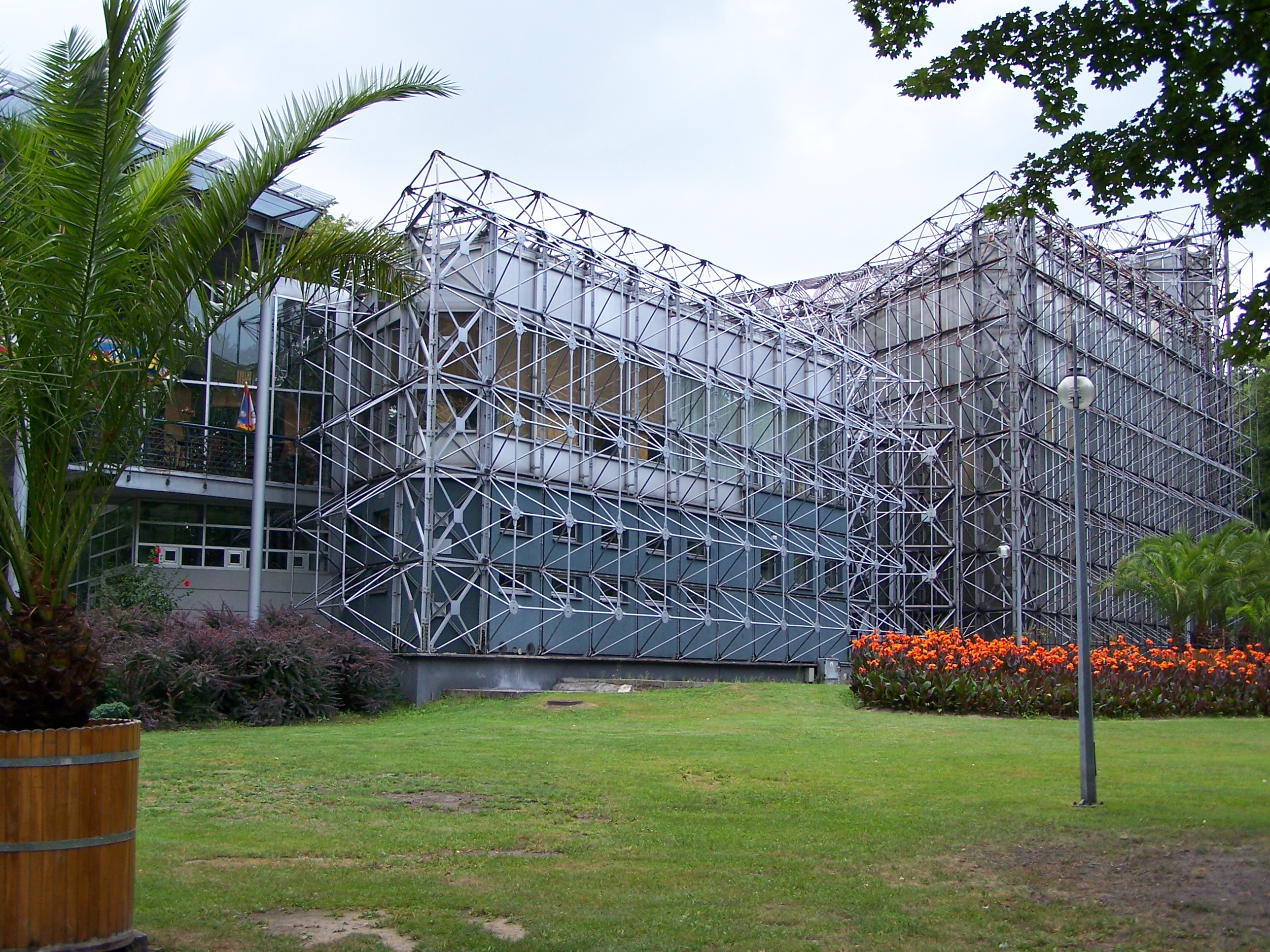 Palmenhaus in Gleiwitz in Oberschlesien.